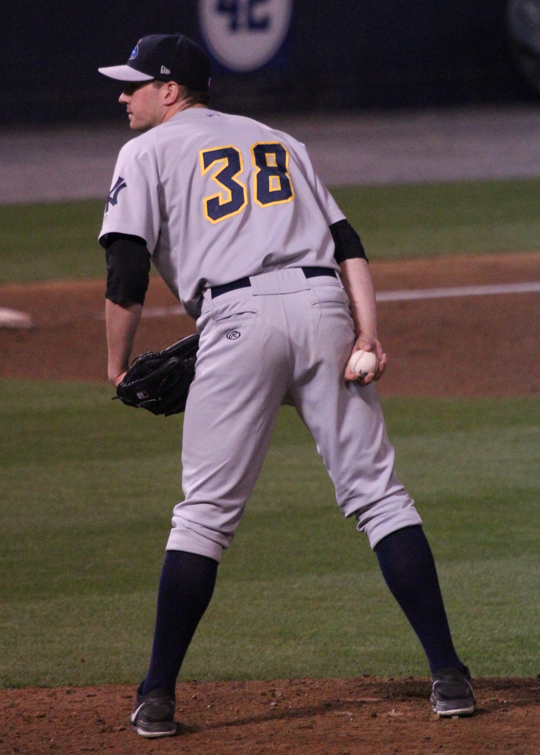 5/3/13 Danny Burawa pitching.